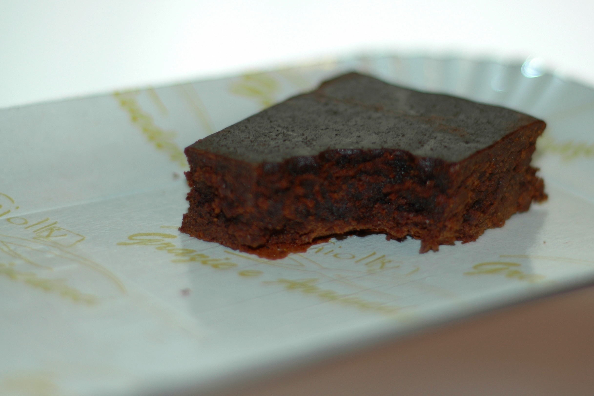 La torta Barozzi è un dolce tradizionale di Vignola - Italia. Nel 1907 (quarto centenario della nascita di Jacopo Barozzi), la "Torta Nera" venne ribattezzata in "Pasta Barozzi" o "Torta Barozzi".